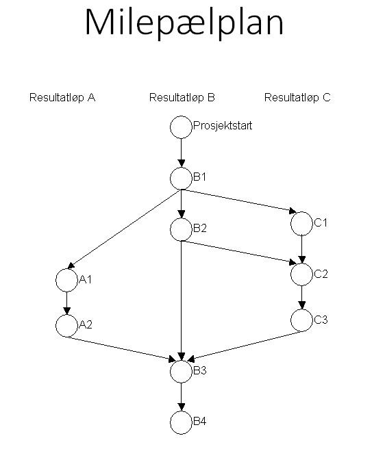 Planleggingsverktøy